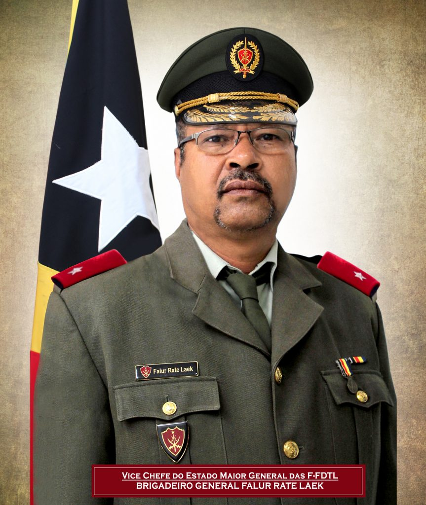 Brigadegeneral Falur Rate Laek